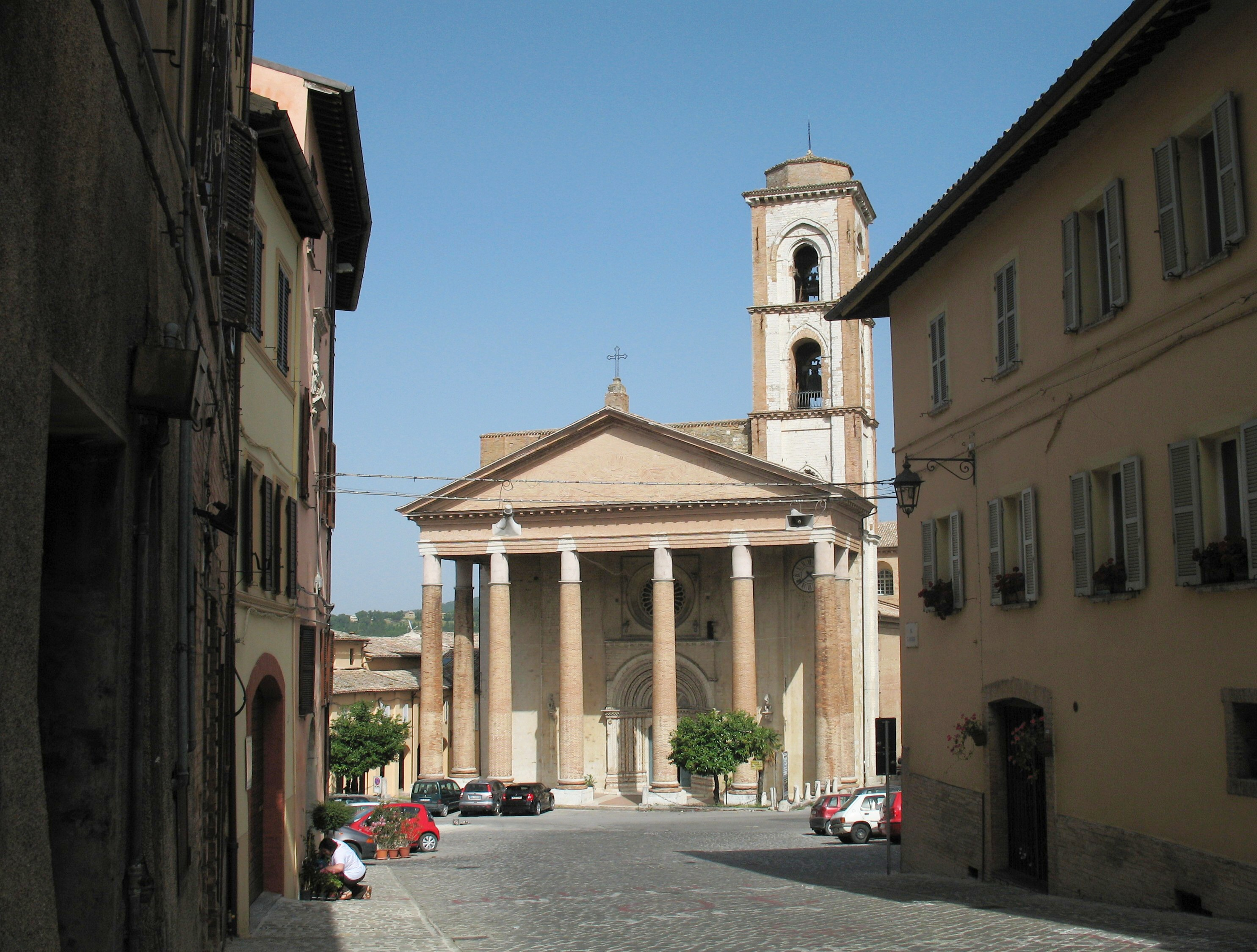 Bazilika San Venanzo